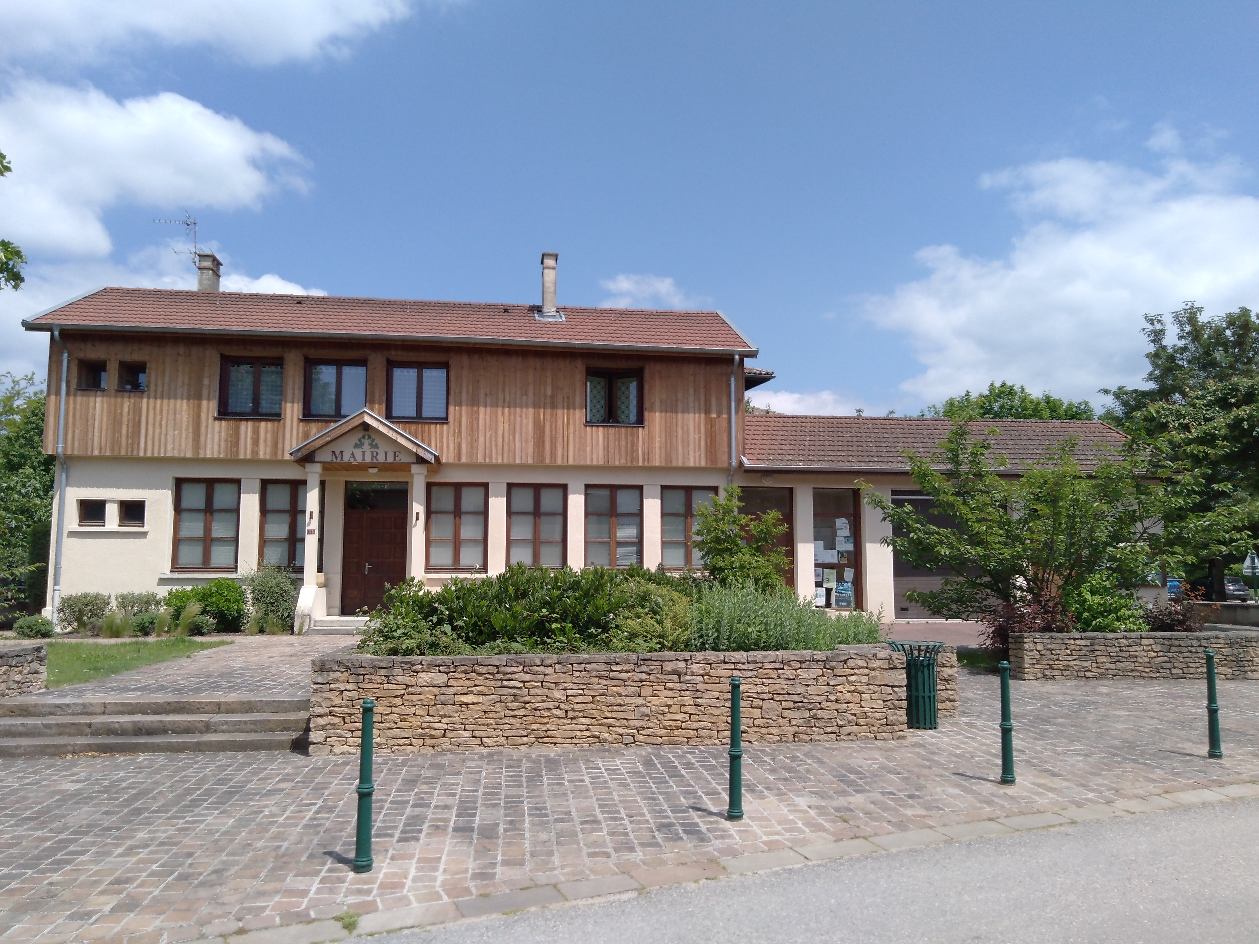 Beauvoir en Royans (mairie)